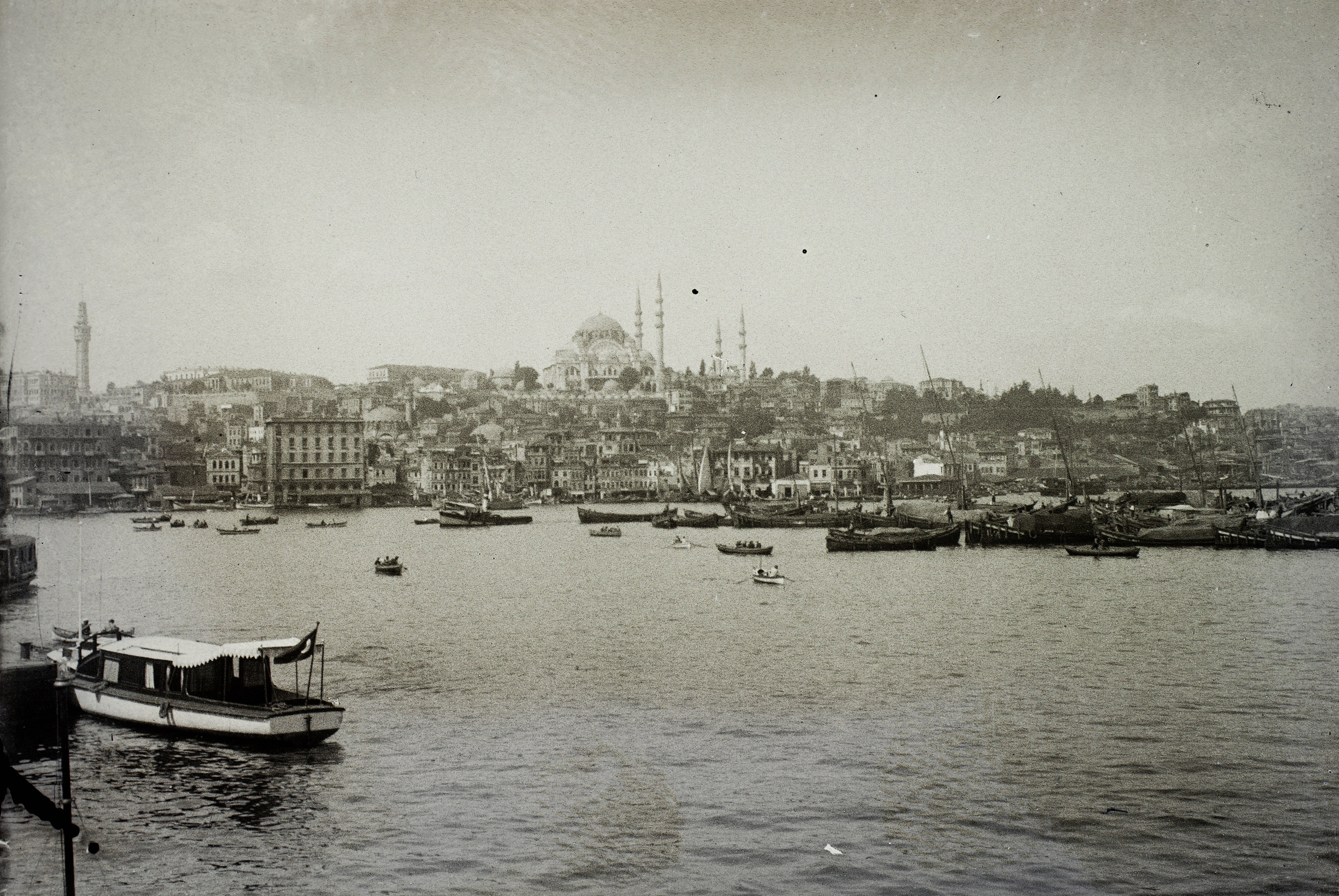 Aranyszarv-öböl. Location: Turkey, Istambul Tags: port, mosque Title: Aranyszarv-öböl.